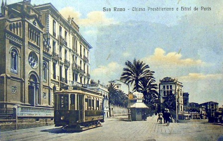 Sanremo, tram di fronte alla stazione